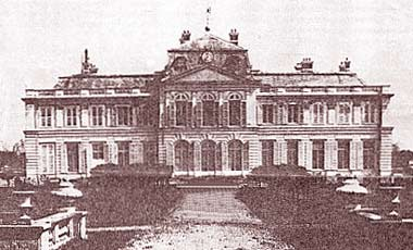 Château de Petit-Bourg à Evry (Essonne). Détruit en 1944.